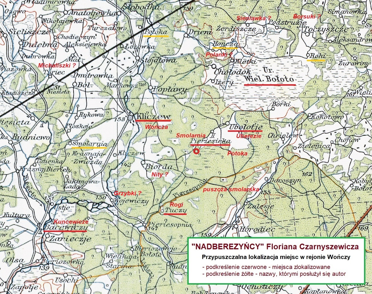 Miejsca, w których toczy się akcja powieści "Nadberezyńcy" Floriana Czarnyszewicza